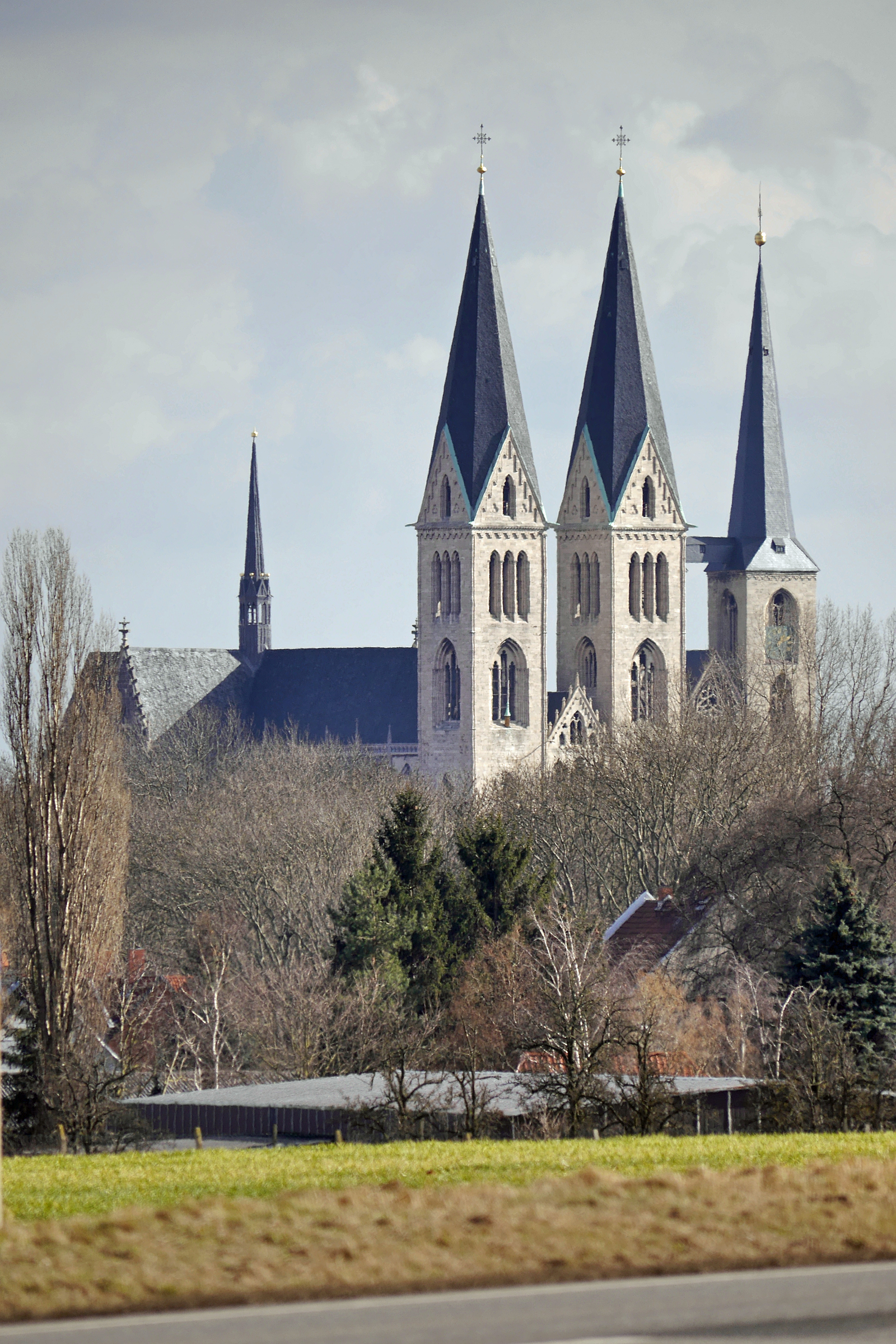 Dom und Martinikirche in Halberstadt